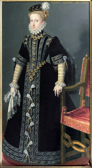 Portrait of Anna of Austria (1549–1580), Queen of Spain